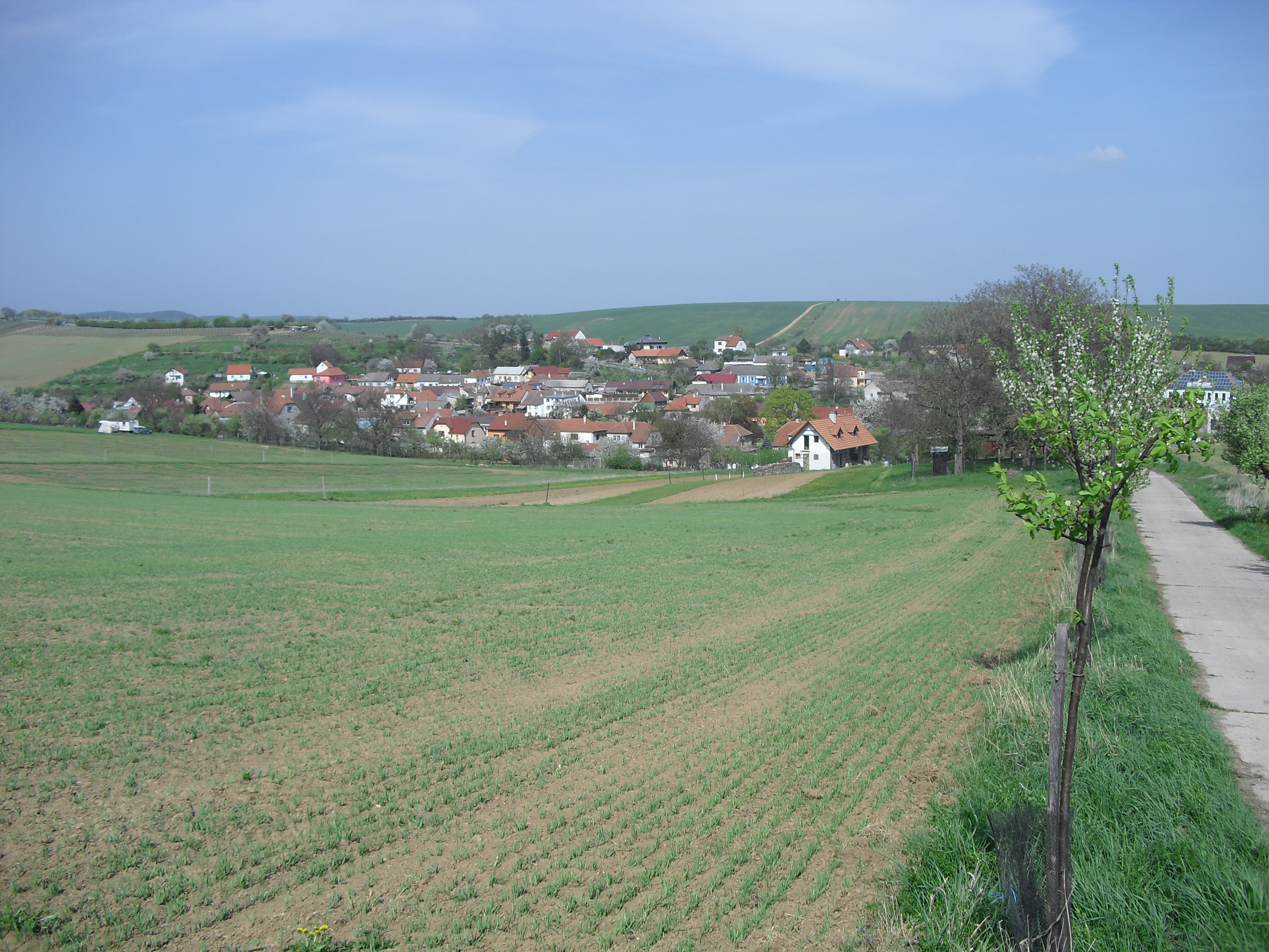 Modrá, celkový pohled